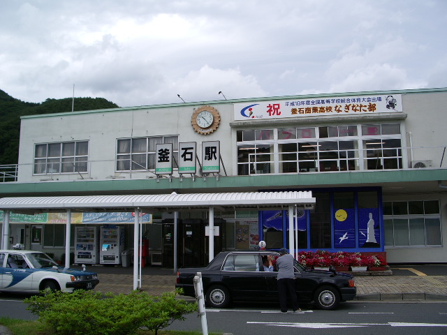 JR釜石駅